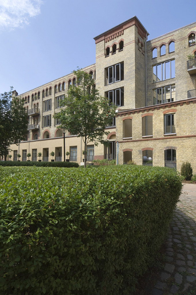 Berlin-Pankow, Mühlenstr. 9-11, Mälzerei: Tenne an der Südseite.